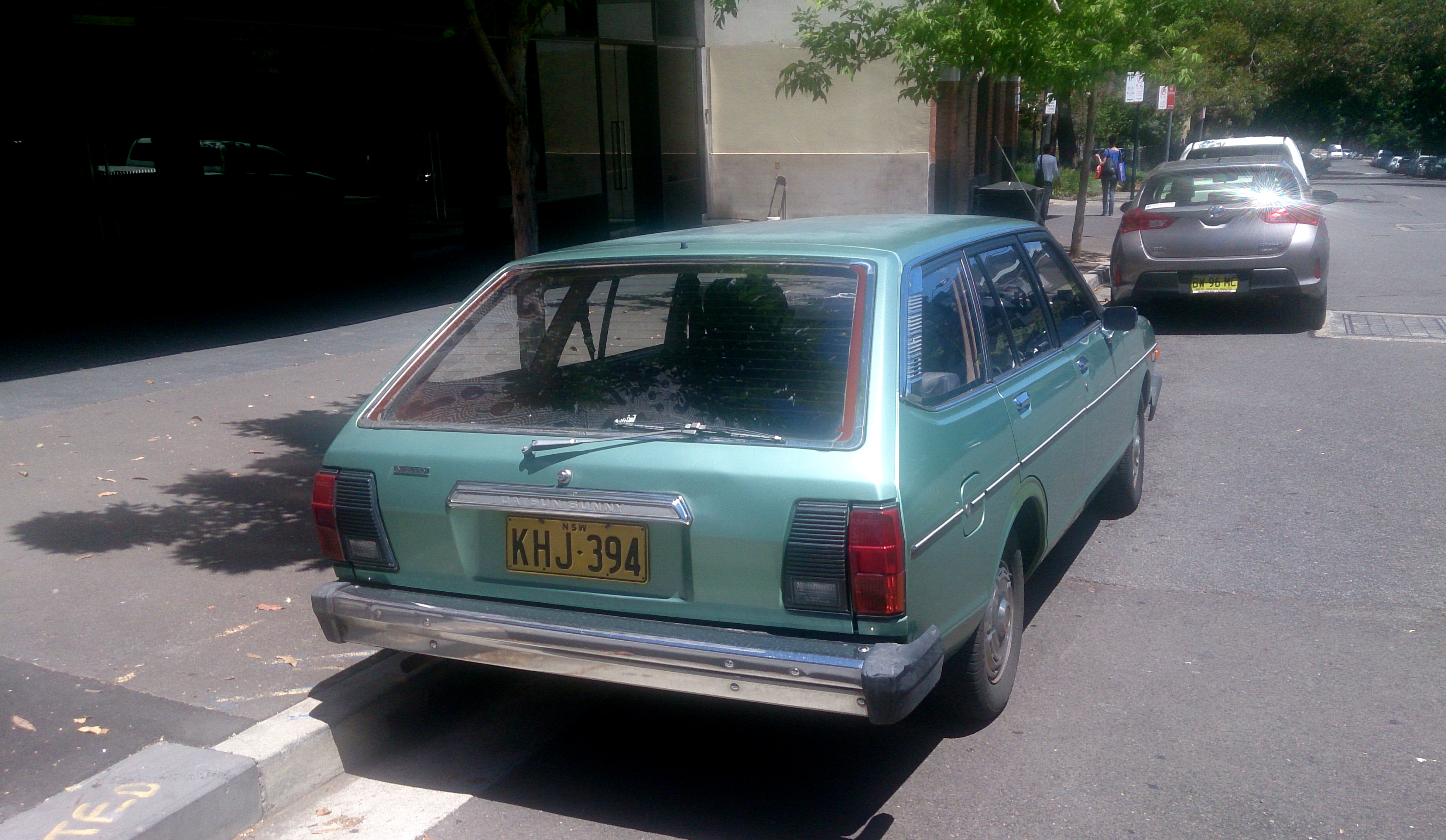 1979 Datsun Sunny Wagon